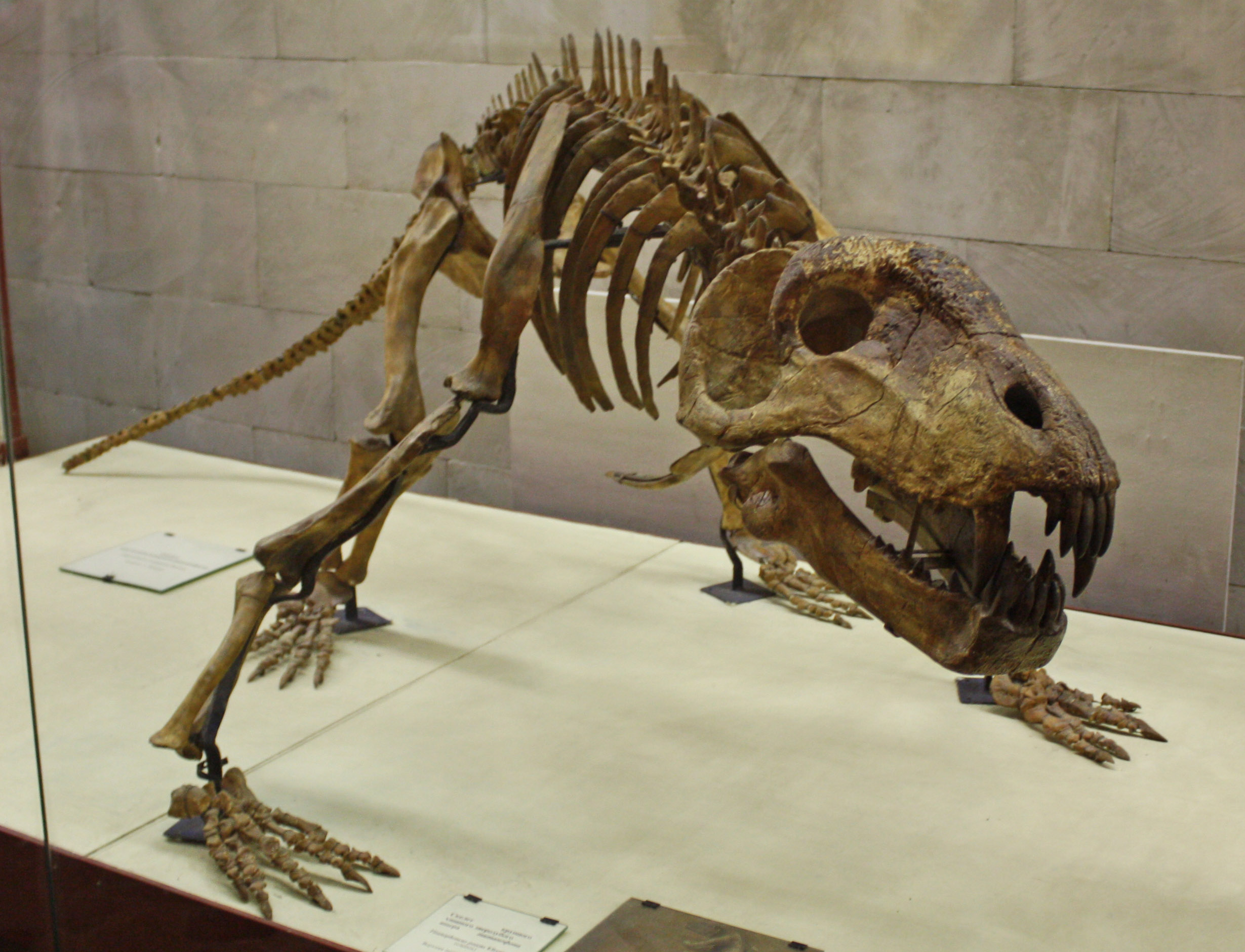 Titanophoneus potens skeleton